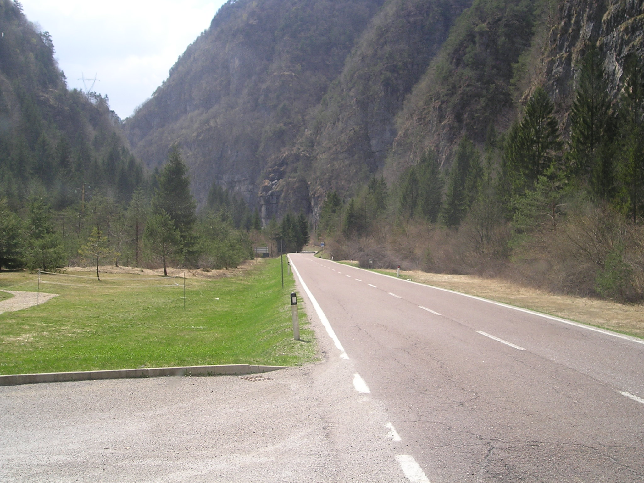 Vista della SS 240 di Loppio e della Val di Ledro nel tratto che scende a Storo